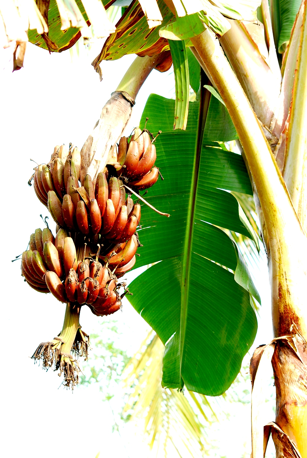 ചെങ്കദളി-വാഴക്കുല